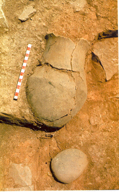 Tinaja lisa en el momento de su descubrimiento